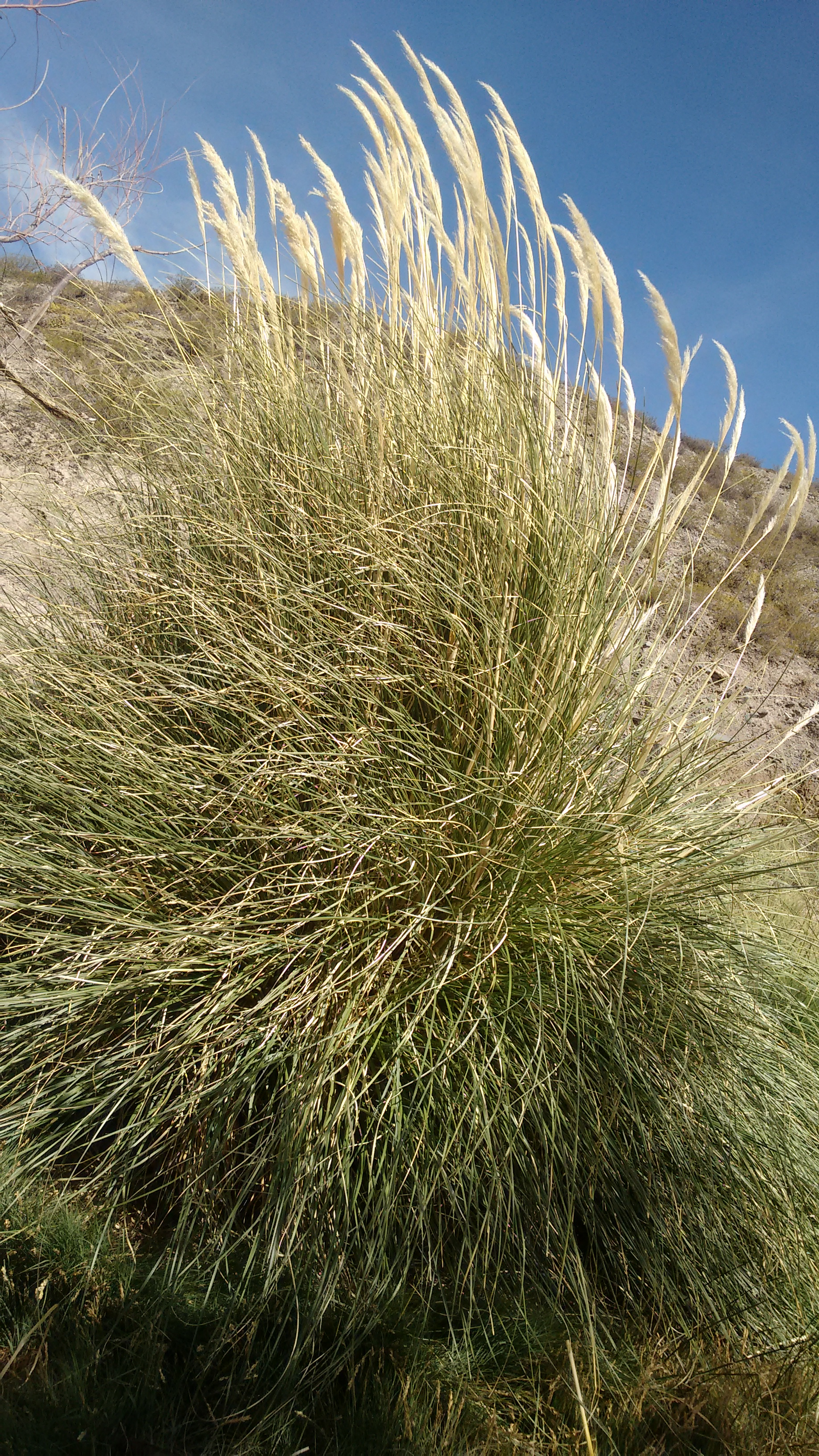 monumento natural. lugares